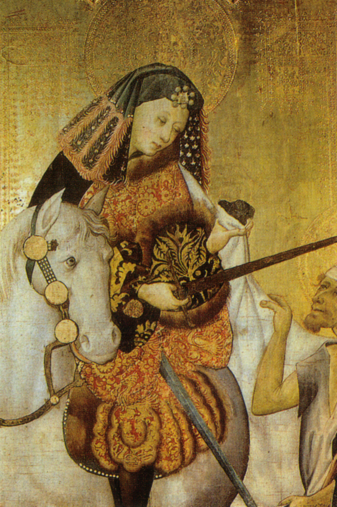 Gonzalo Perez, retablo dei santi orsola, martino e antonio, scena dell'elemosina di s. martino, 1420 valencia museo provincial